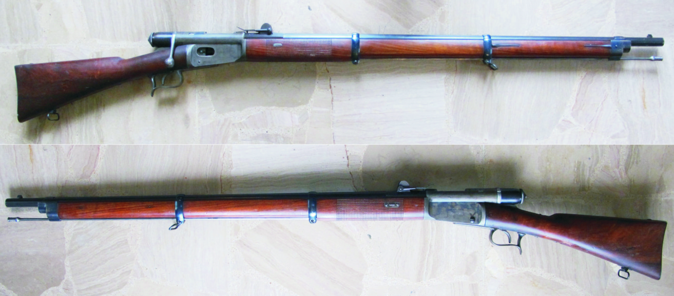 Fusil Vetterli modèle 1871.